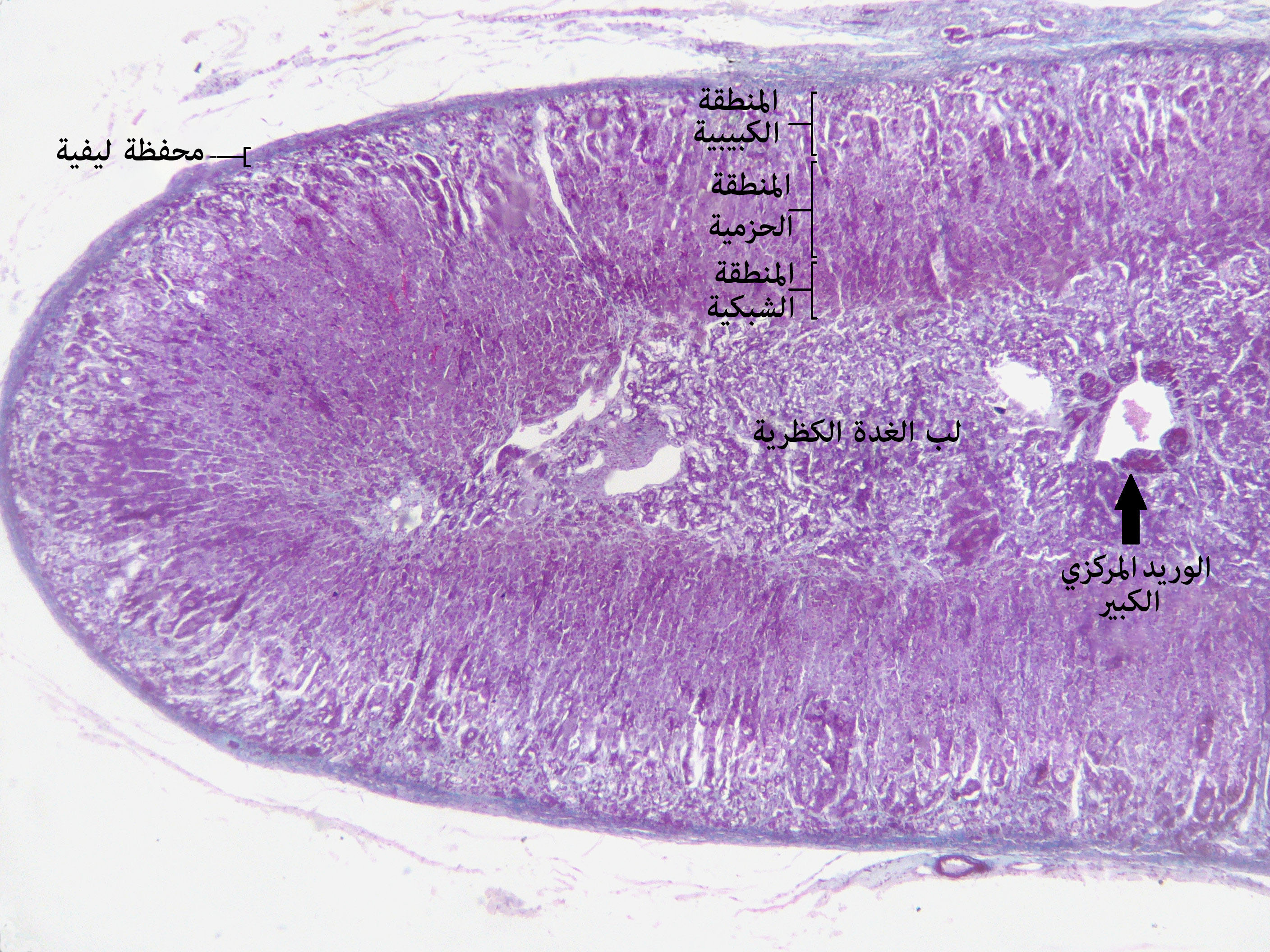 مقطع يظهر أجزاء الغدة الكظرية: القشرة واللب، وأجزاء القشرة الكظرية الثلاثة، والوريد المركزي في لب الكظر.